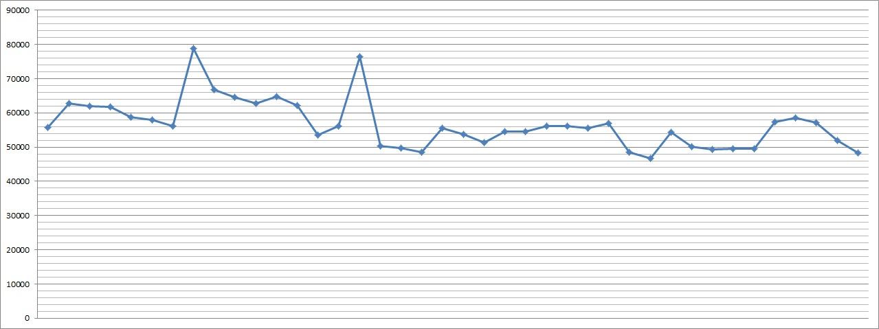 Demonstrativo de vendas da revista Action Comics entre suas edições 837 e 874, período em que principalmente Geoff Johns esteve à frente dos roteiros. Com a conclusão da história "Novo Krypton", Johns deixou a revista para participar do relançamento da revista Adventure Comics